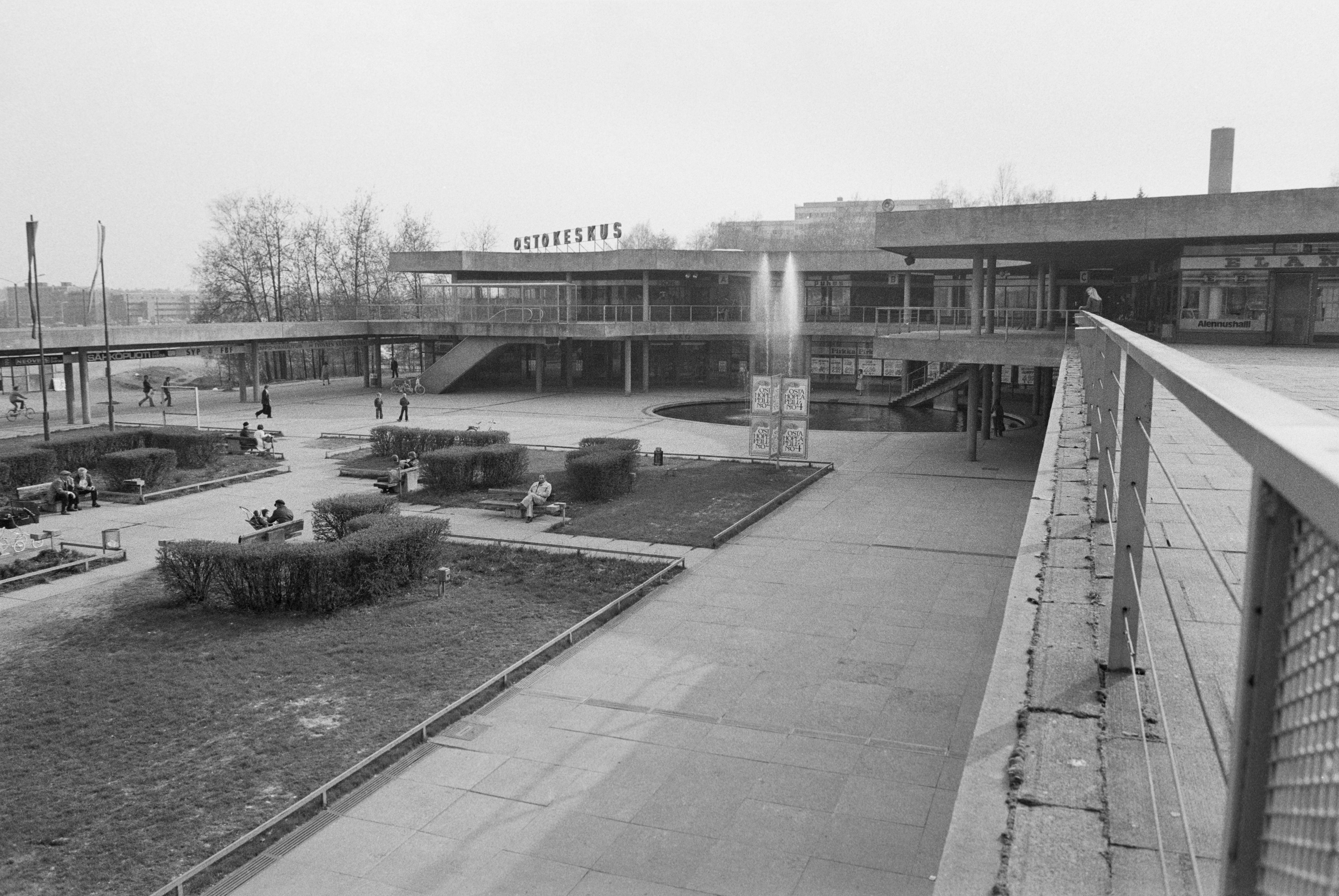 Puotinharjun ostoskeskus 1970-luvulla